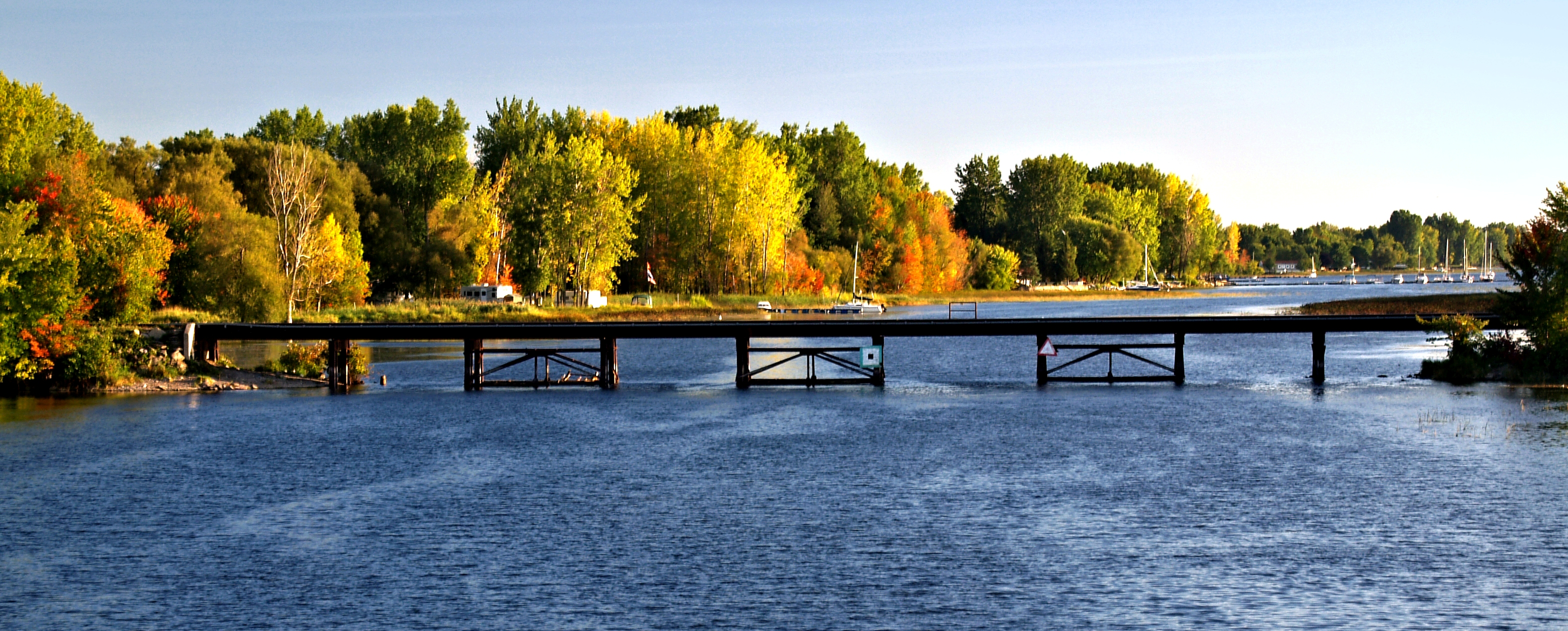 Noyan (Québec) - Pont de la voie ferrée du Canadien National sur la rivière Richelieu